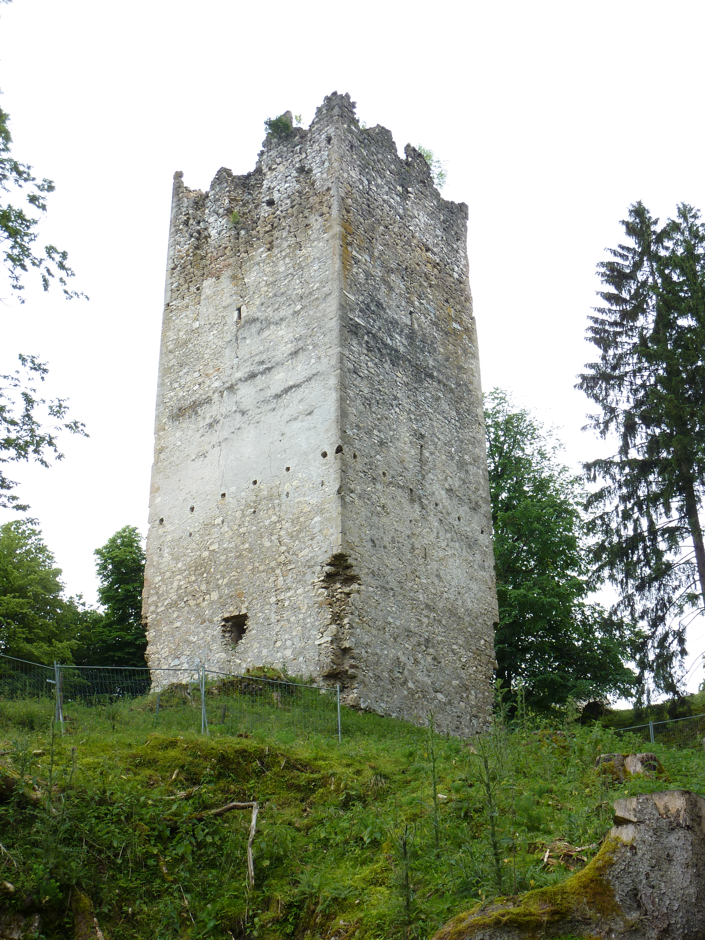 Burgruine Altrosegg, Rosegg / Rožek, Kärnten - Bergfried